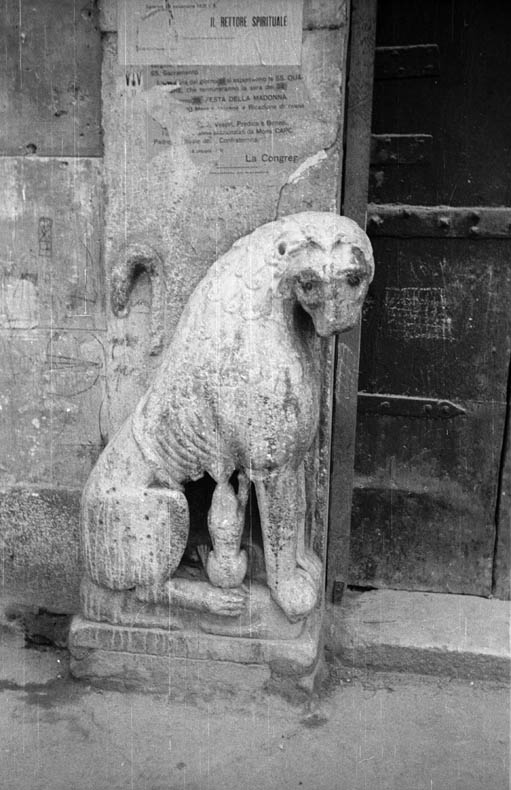 Leone scolpito, esterno della Cattedrale di Salerno